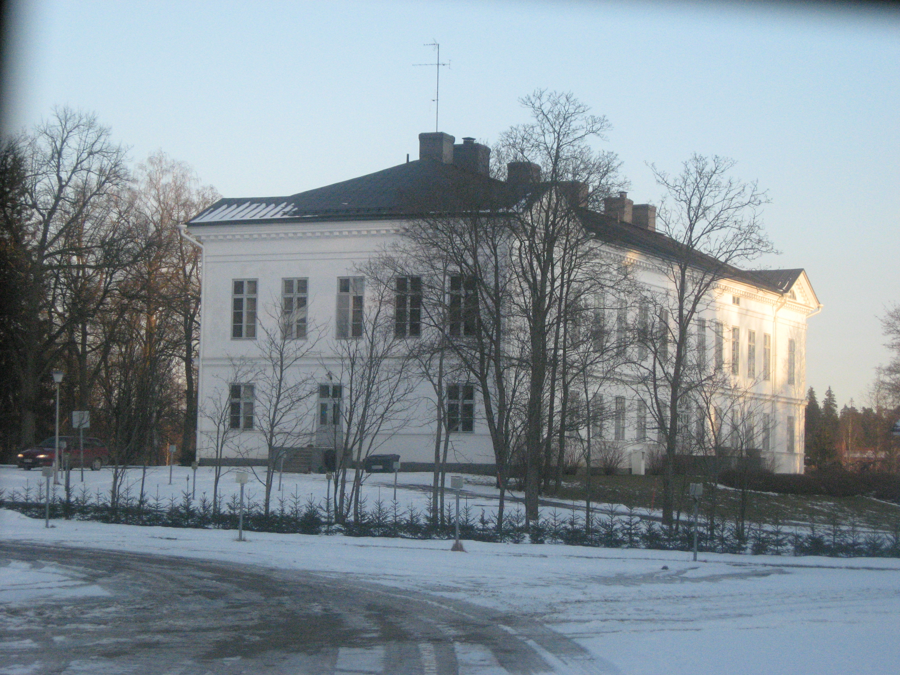 Jokioisten kartanon päärakennus takaa